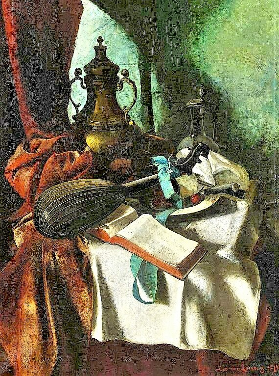 Stilleben